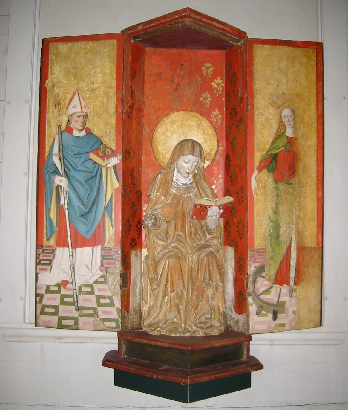 Kråksmåla kyrka. Heliga Birgitta.